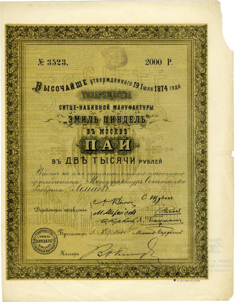 Именной пай в 2 тыс. руб. Товарищества ситце-набивной мануфактуры "Эмиль Циндель" в Москве